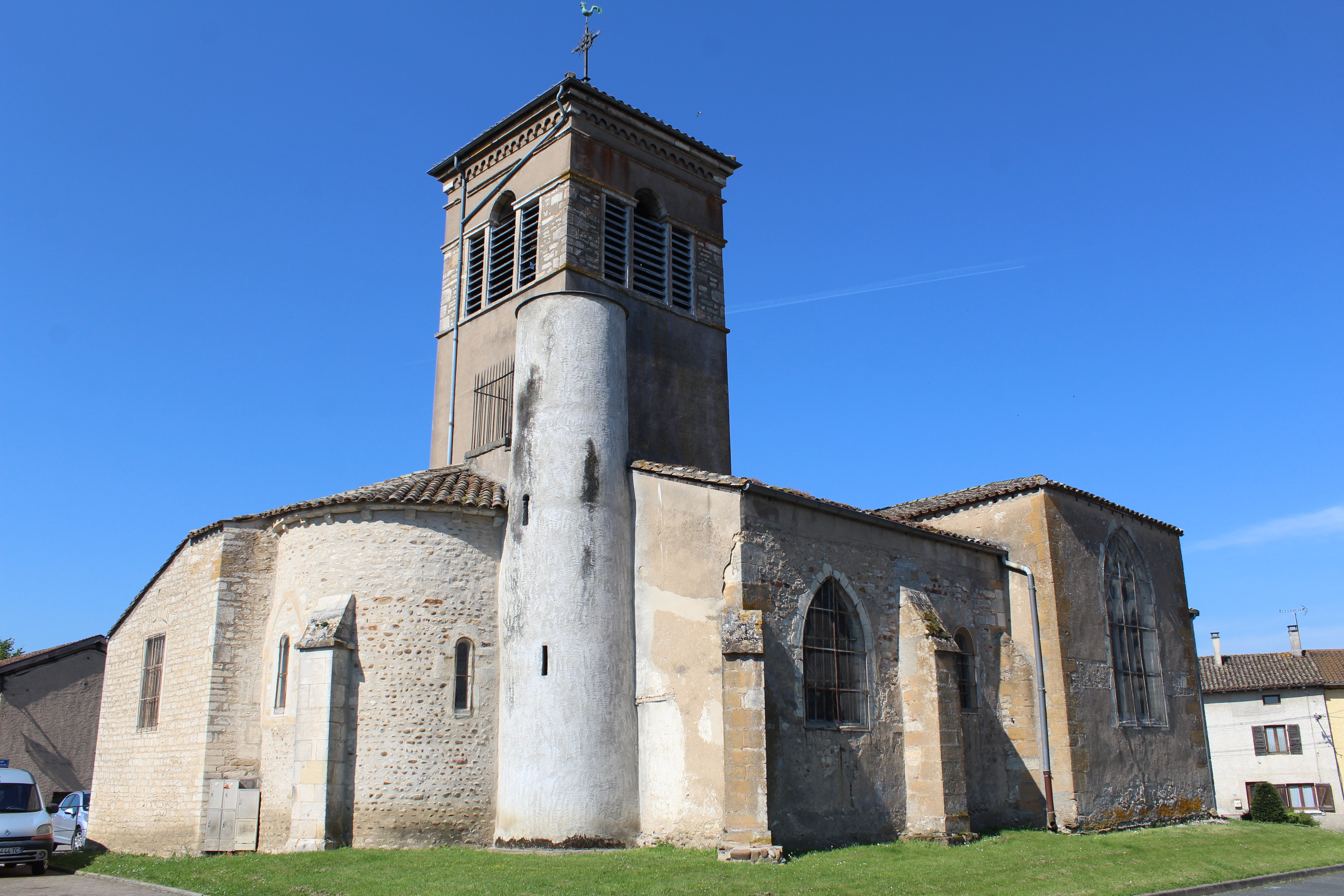 Église Saint-Pierre de Messimy-sur-Saône.